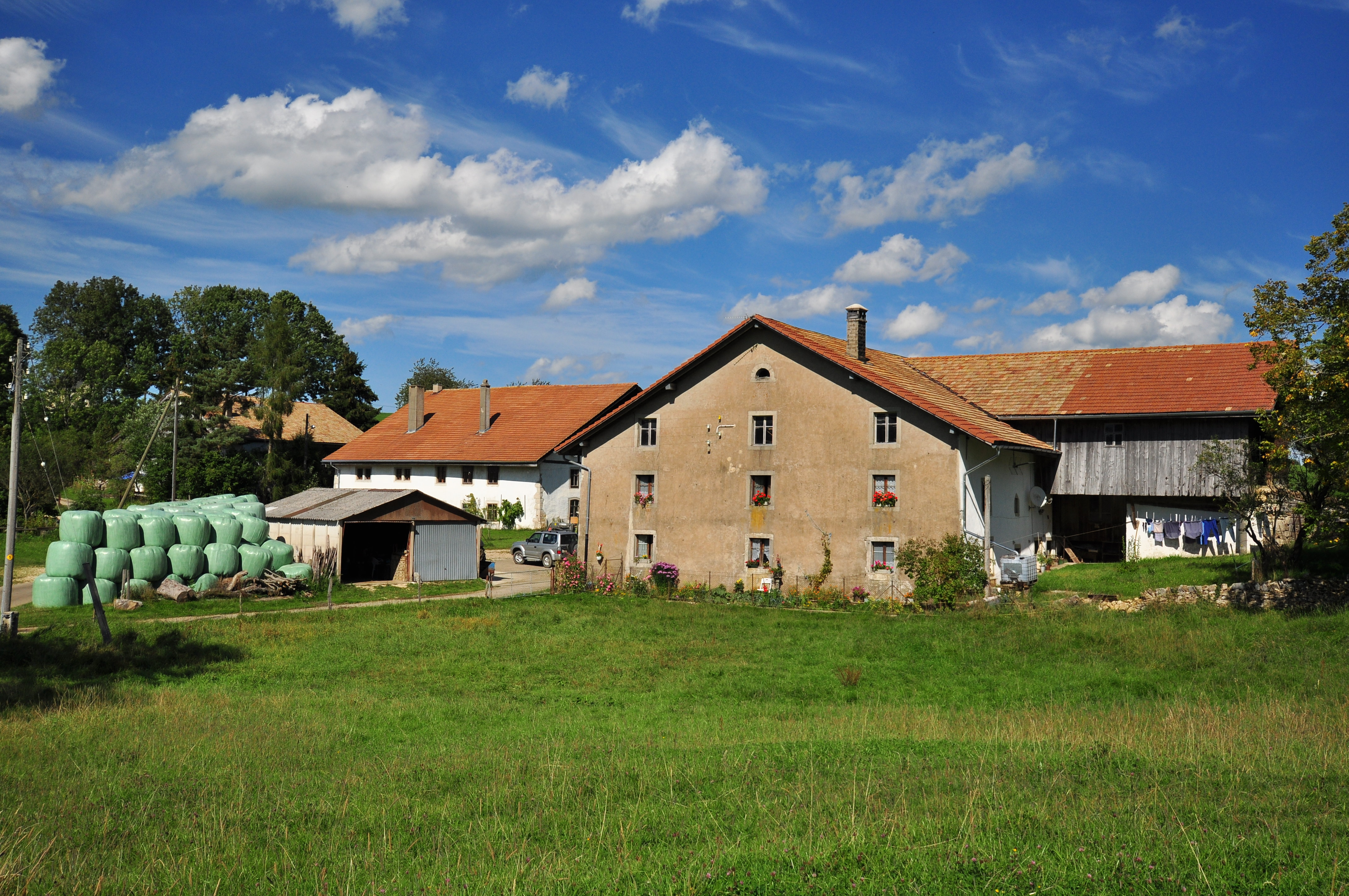 Le Bémont Ferme